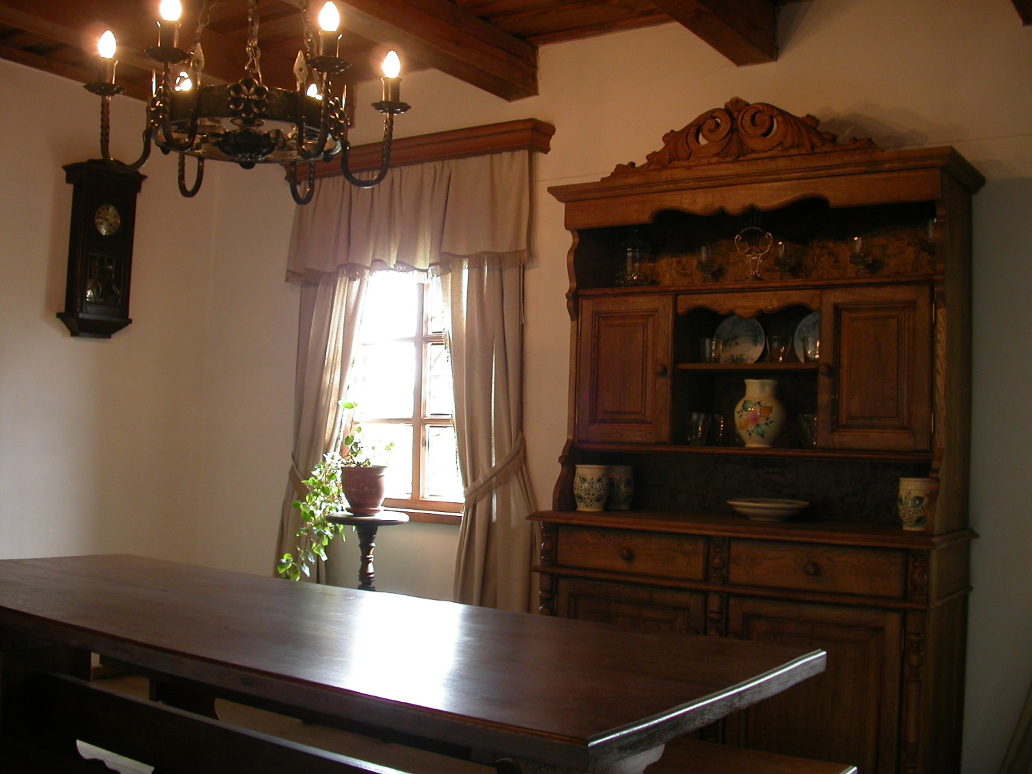 Унутраныя інтэр'еры музея А.Міцкевіча ў Завоссі. Фота з сайта Дзяржаўнага музея гісторыі беларускай літаратуры